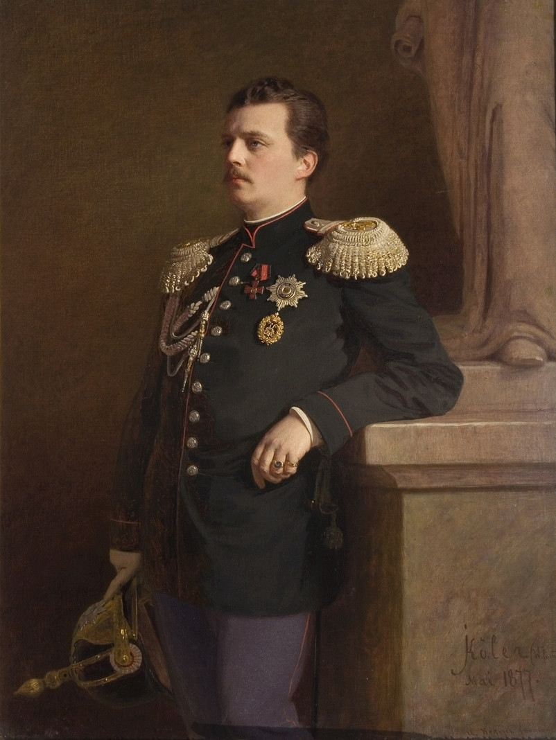 Великий князь Владимир Александрович (1847—1909) — третий сын императора Александра II и императрицы Марии Александровны; член Государственного совета, сенатор; генерал-адъютант, генерал от инфантерии, младший брат Александра III, президент Императорской Академии художеств.